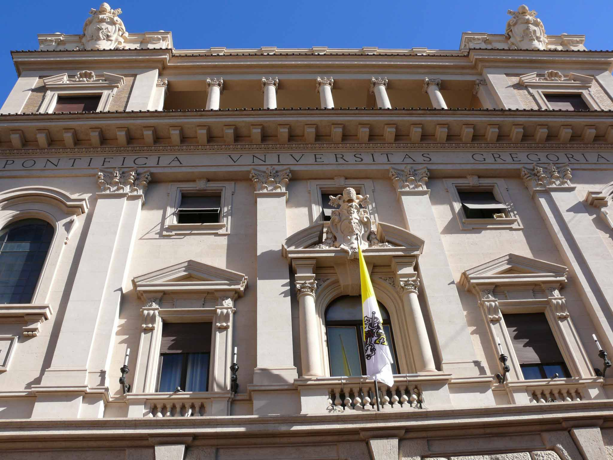 Foto da Pontificia Universidade Gregoriana em Roma